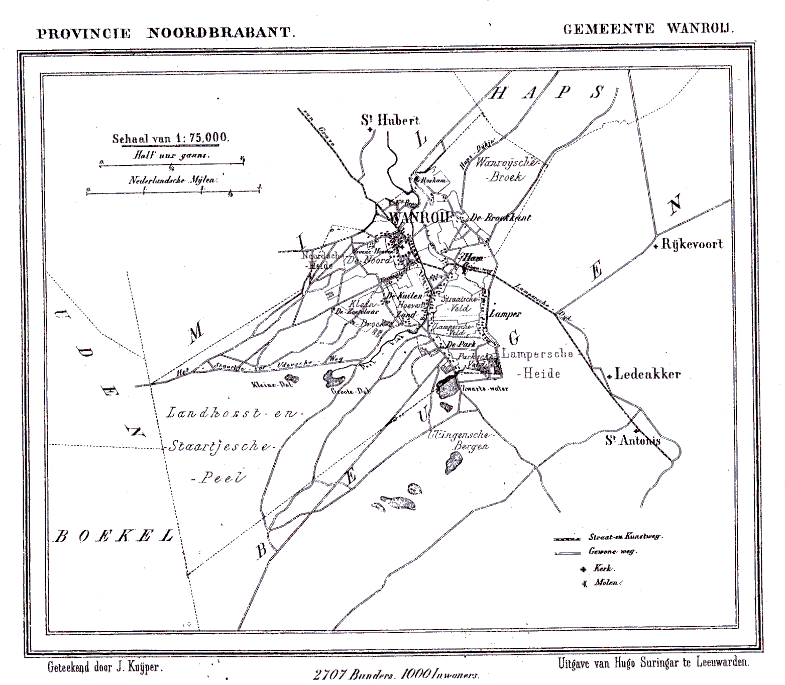 Nederland, Noord-Brabant, Gemeente Wanroij